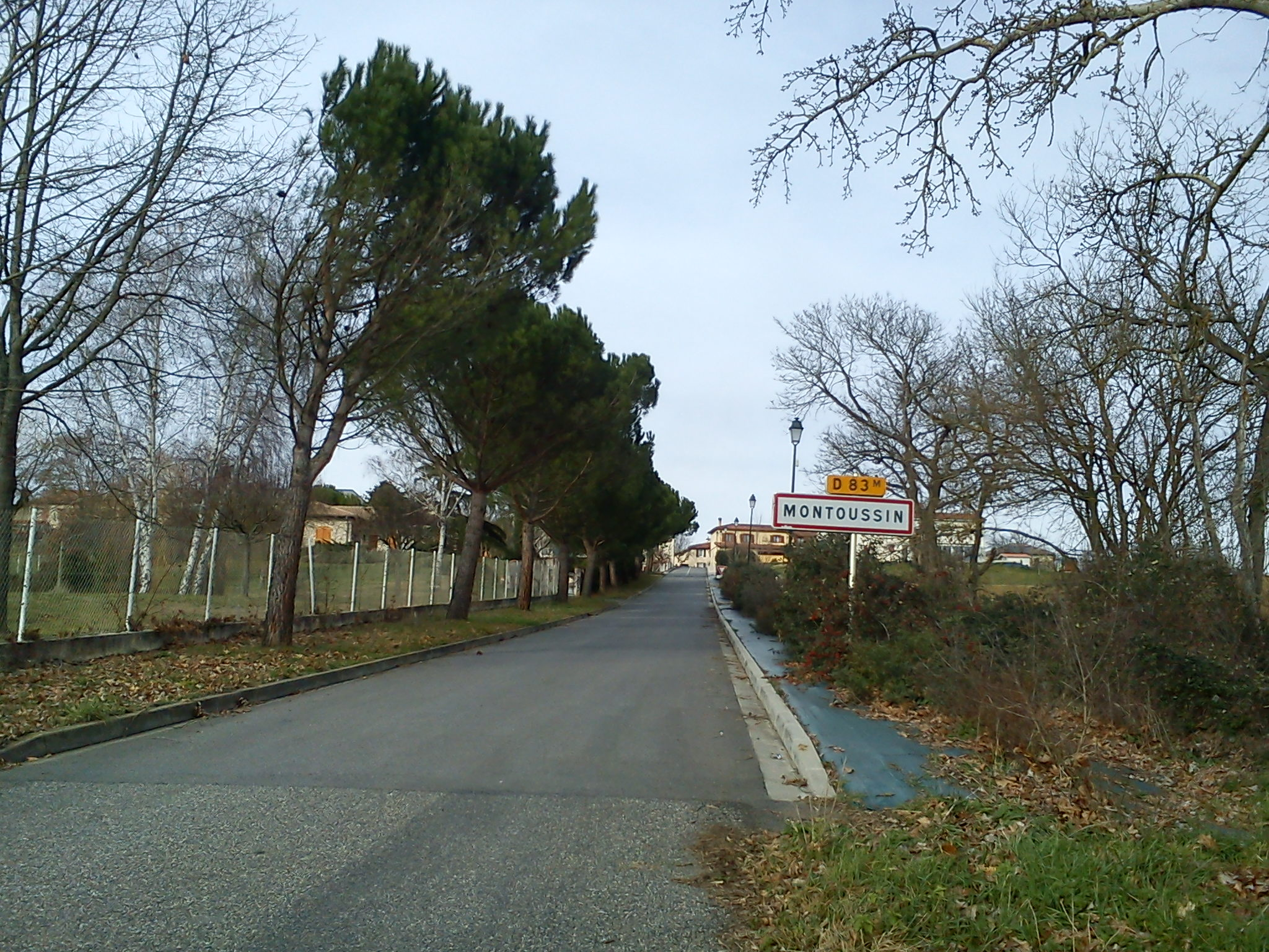 Montoussin